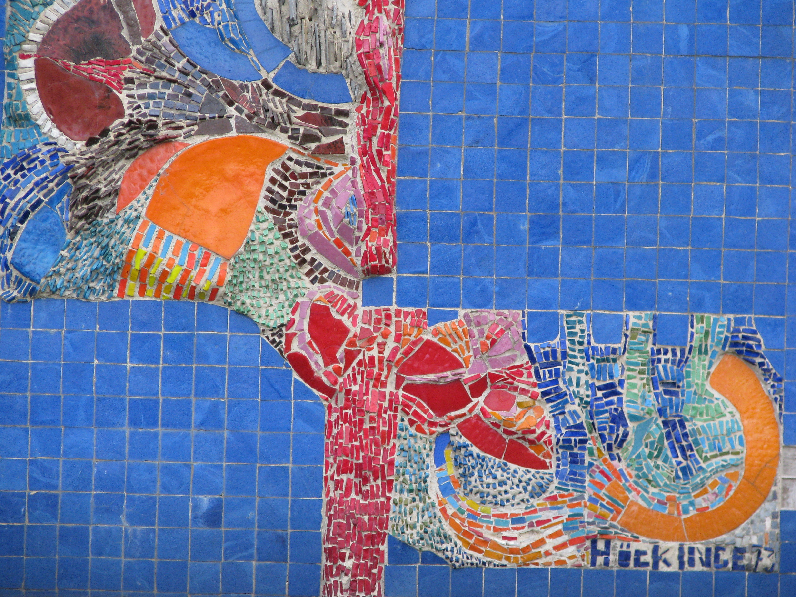 Mosaik an der Westfassade des Kindergartens Bachlechnerstraße, Innsbruck, von Inge Höck, 1973 (Detail)